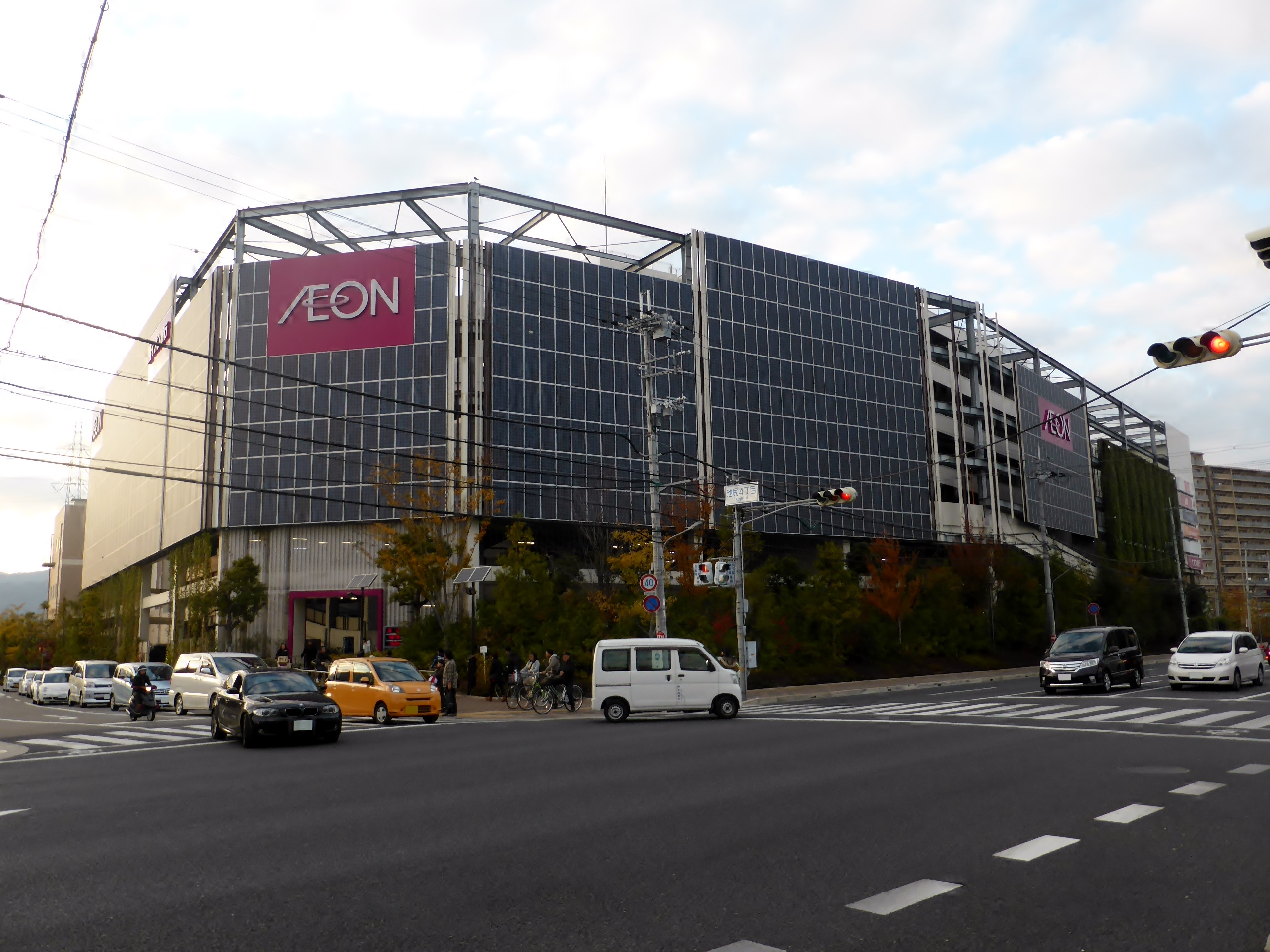 イオンモール伊丹昆陽のソーラーパネル